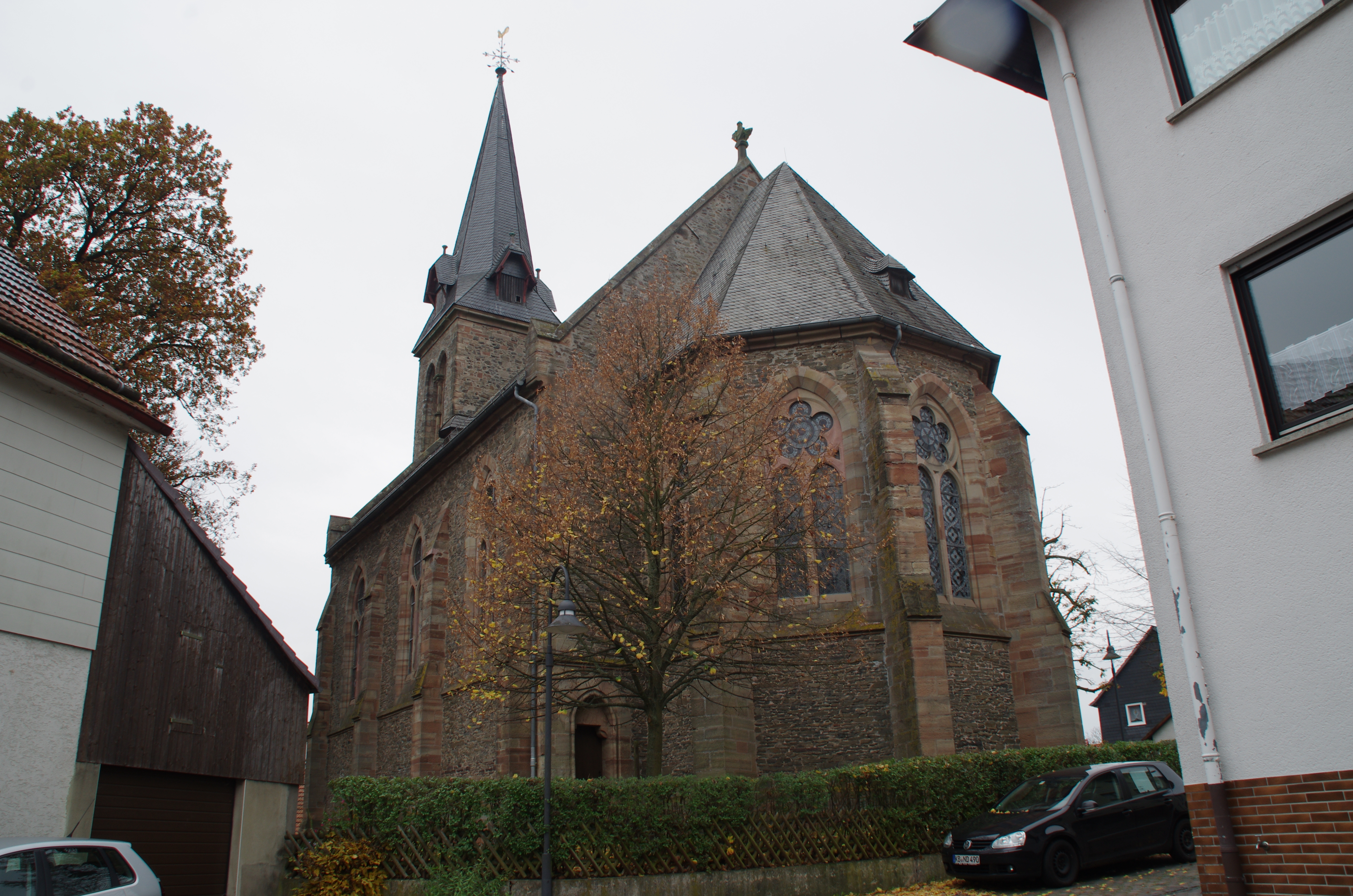 Frankenau in Hessen. Die Kirche wurde 1876 bis 1878 erbaut. Es ist ein neugotischer Saalbau.